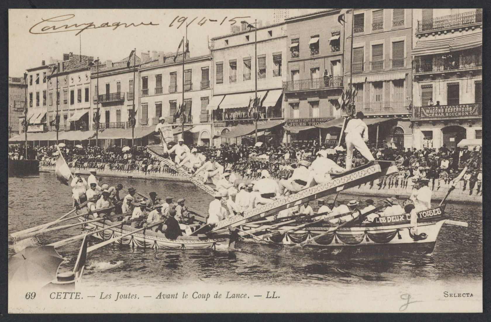 Cette joutes - Archives départementales de l’Hérault - FRAD034-2FICP-02467-00001